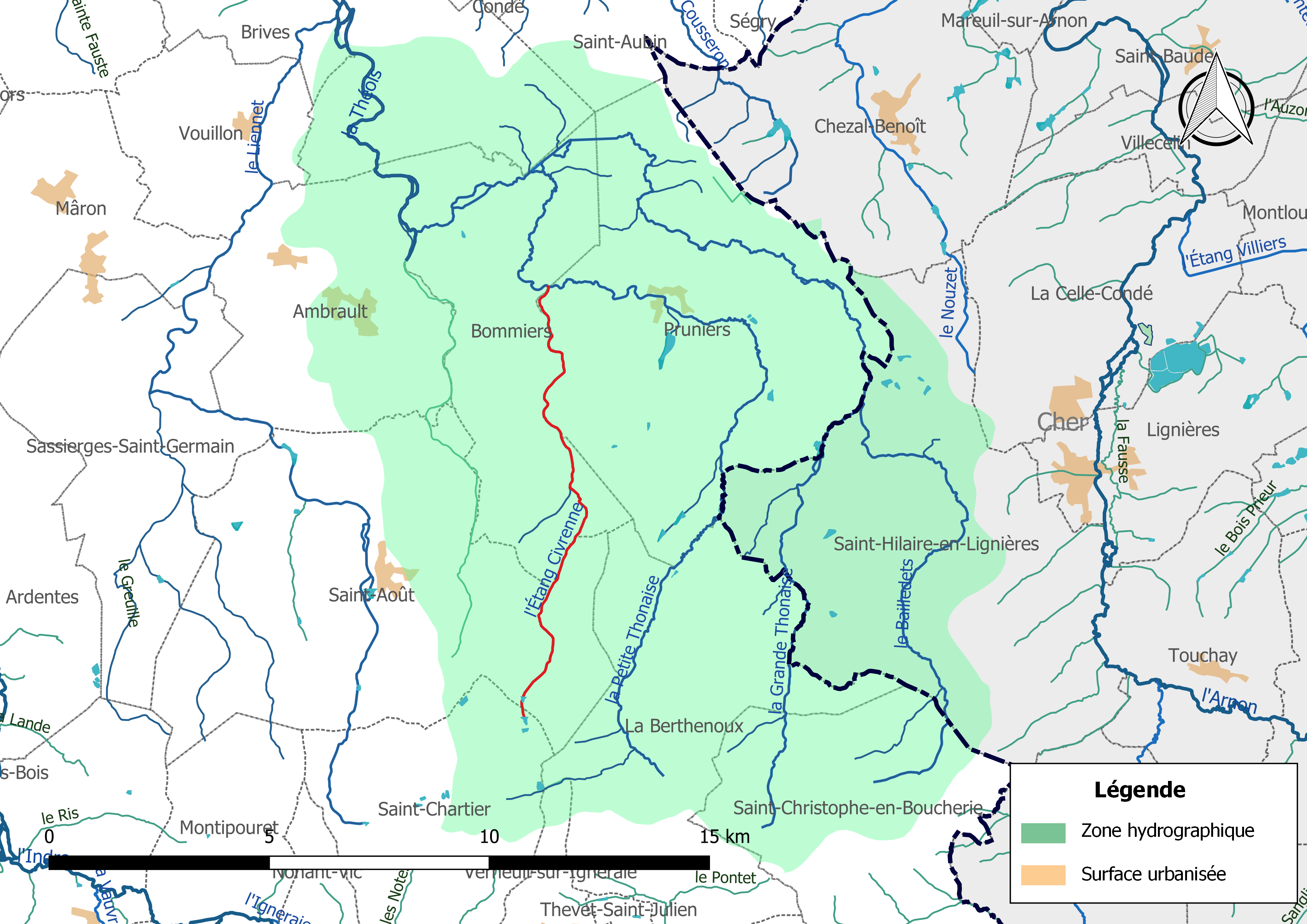 Carte du cours d'eau « l'Étang Civrenne » (France) et de la zone hydrographique dans laquelle il s'insère.